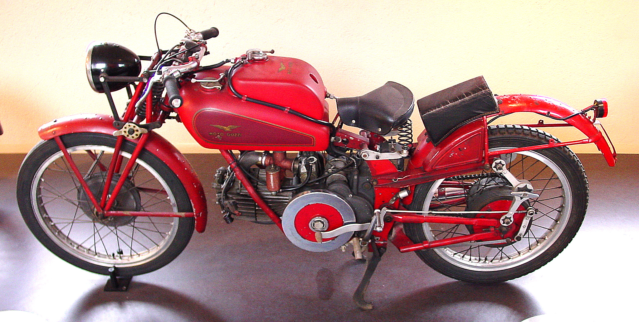 Moto Guzzi Condor - Années 1938-1940